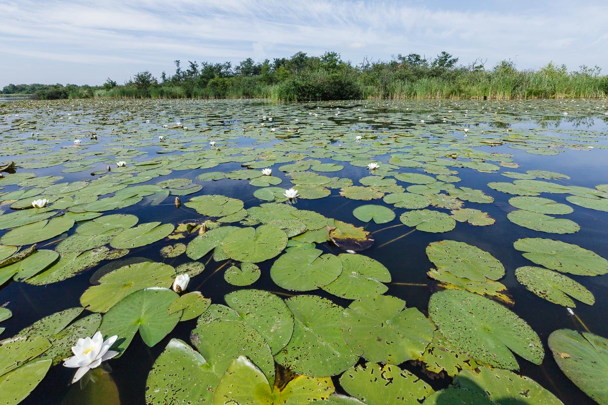 Kortenhoefse plassen, Natuurmonumenten, Kortenhoef gemeente Wijdemeren, Noord Holland, Nederland